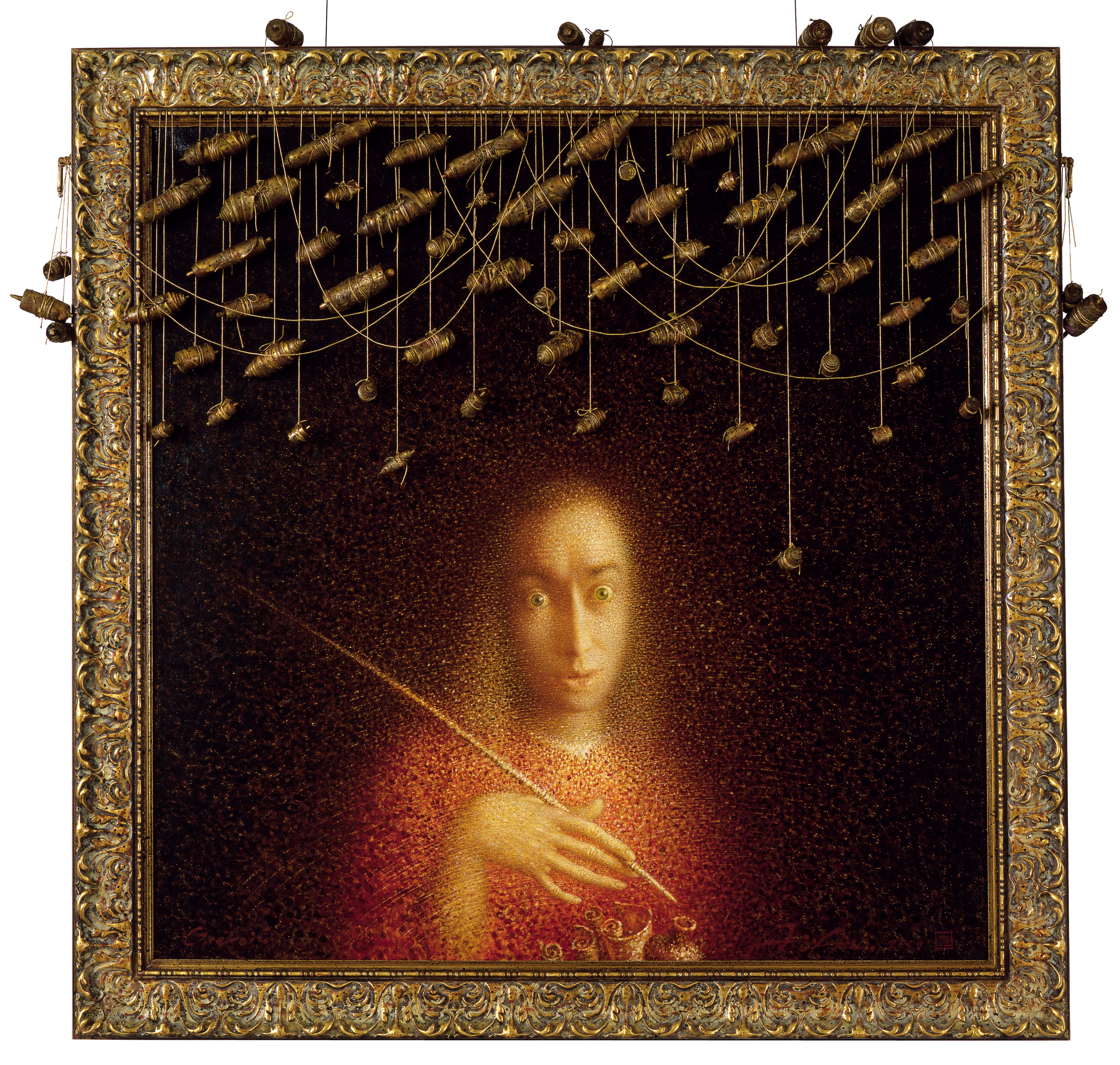 120x120, авторская техника, инсталляция